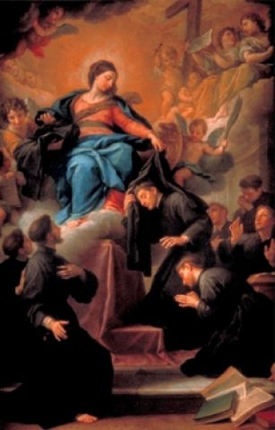 Агостино Мазуччи, Богоматерь и семь святых основателей ордена сервитов (1727)